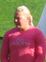 Suvi Helin Kalevan kisoissa, Ratinan stadionilla, Tampereella, 26. heinäkuuta 2008